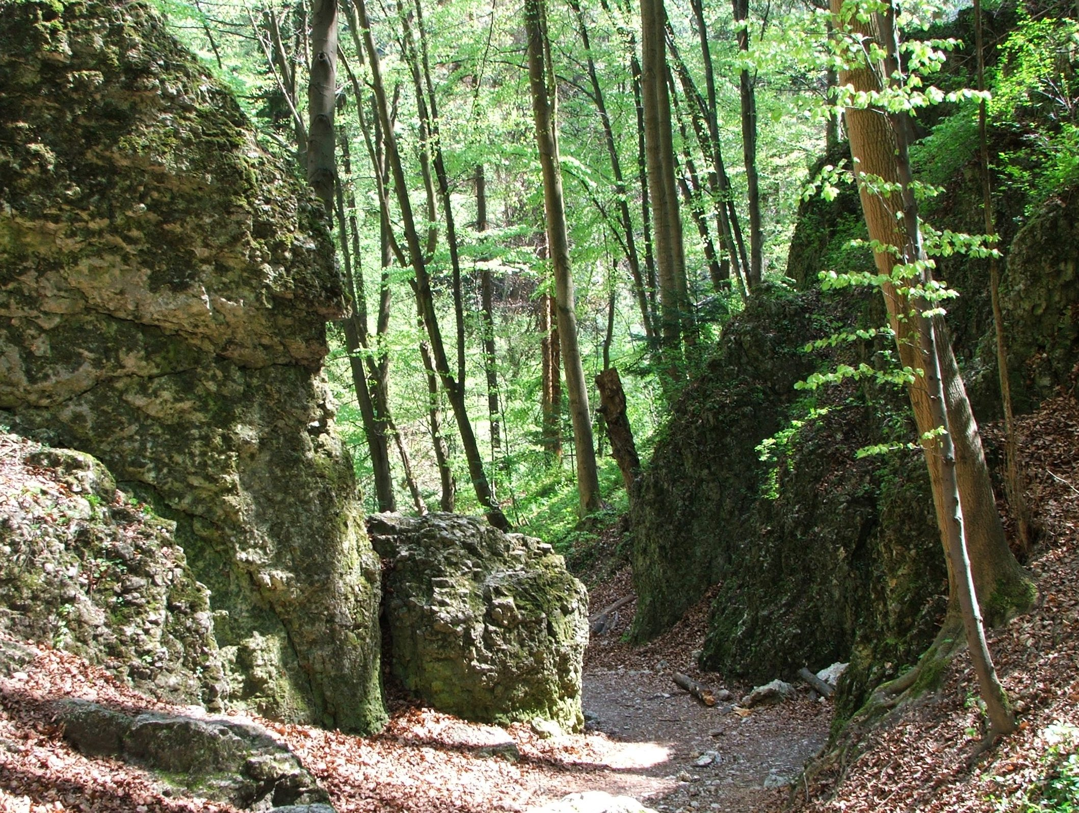 Wąwóz Ciasne Skałki (Ojcowski Park Narodowy)